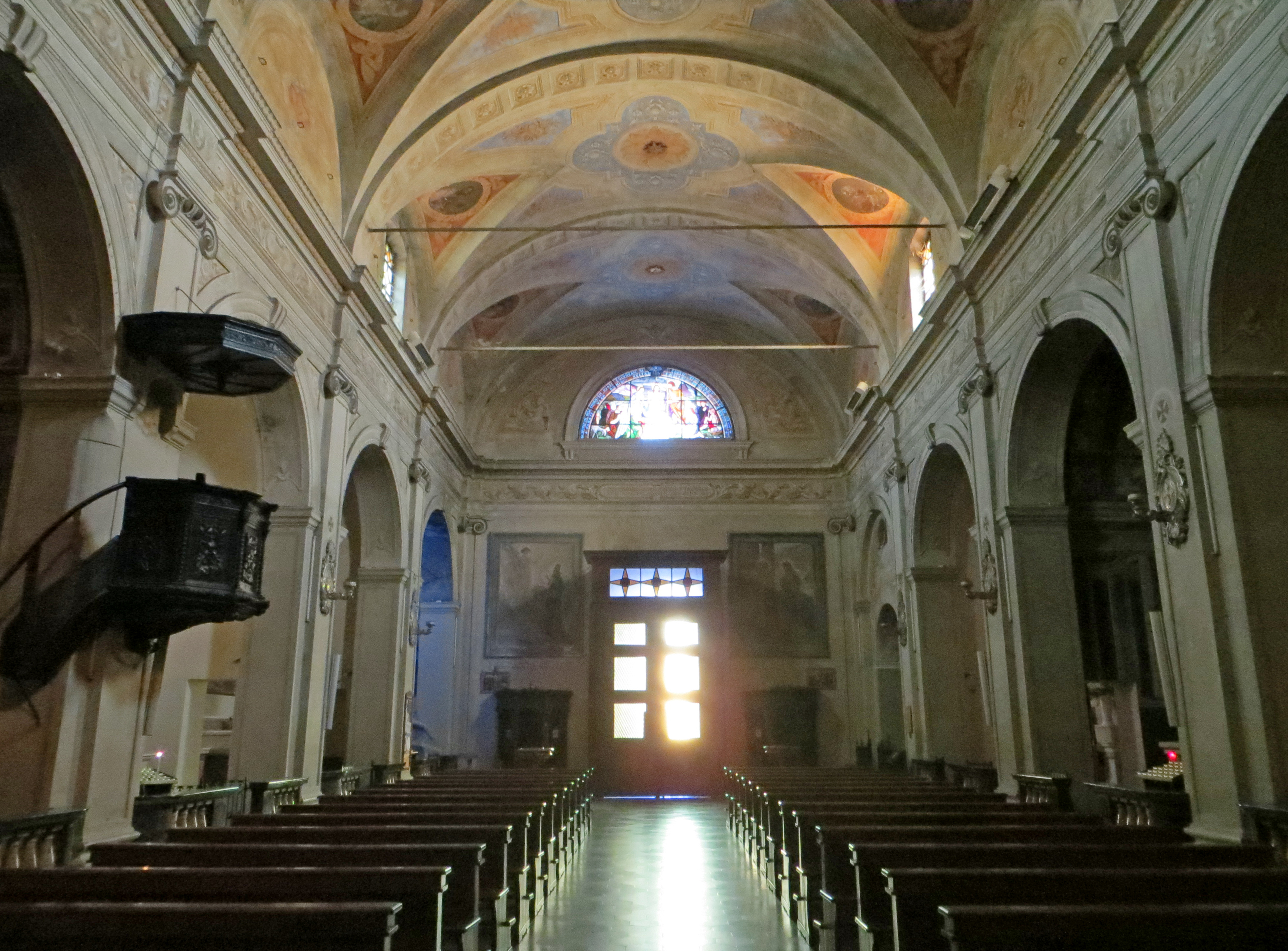 Collegiata di San Giovanni Battista (Pieveottoville, Polesine Zibello) - navata e controfacciata